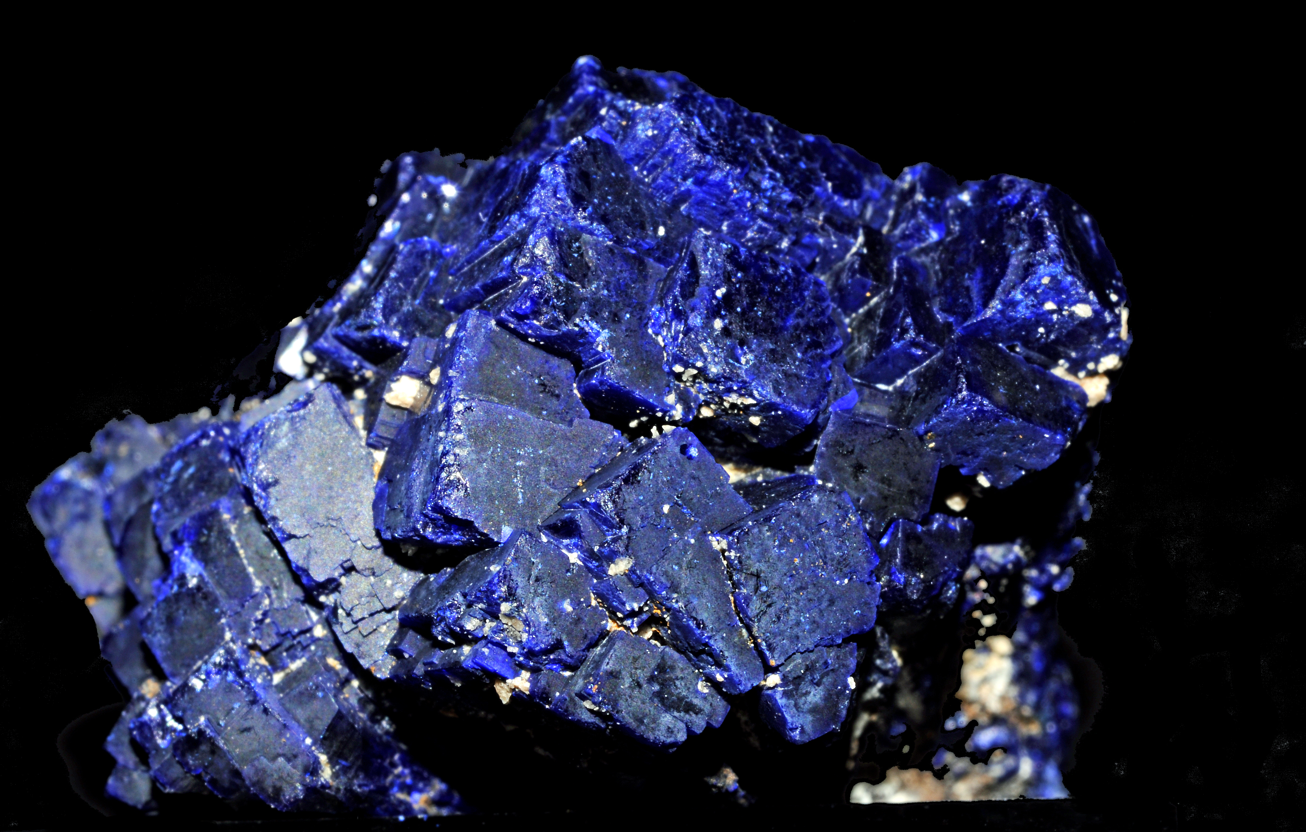 Cristallisation rhomboédrique d'azurite